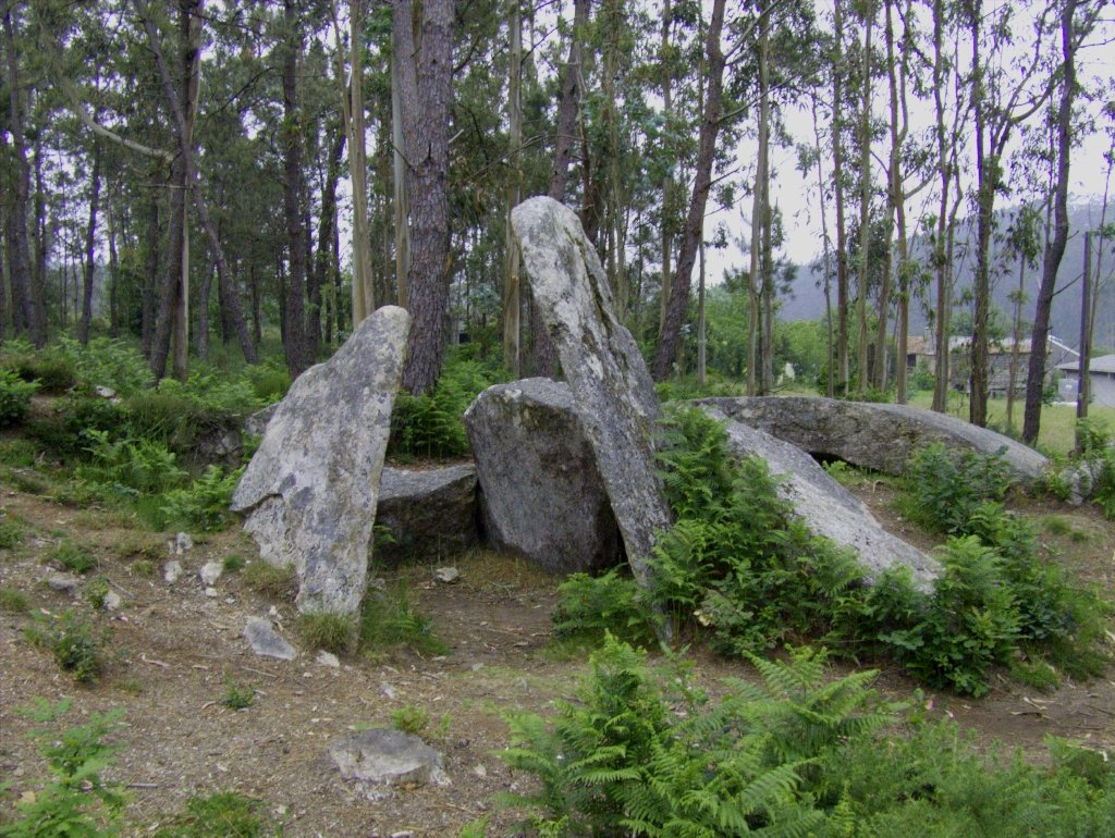 Dolmen de Pedra Cuberta (gl) PARROQUIA: Treos. CONCELLO: Vimianzo CRONOLOXÍA: 4000-3000 a.C. CARACTERÍSTICAS: É un dos monumentos megalíticos mellor coñecidos de Galicia debido ós estudios que Georg e Vera Leisner realizaron nos anos 30 sobre a decoración pictórica do corredor: debuxos de cor negra e vermella sobre fondo branco, así como representacións serpentiformes, ondulados e círculos concéntricos. As pinturas atópanse entre as representacións máis importantes da arte megalítica europea. SITUACIÓN: Sáese do castelo de Vimianzo en dirección Fisterra e no primeiro cruce que atopamos collemos unha pista á esquerda. Seguímo-la pista ata chegar a Areosa e alí atopamos un desvío á esquerda cun indicador que sinala “Pedra Cuberta e Xora”. Collemos esa pista e a 200 metros xiramos á dereita e continuamos ata chegar ó cartel que indica o dolmen.